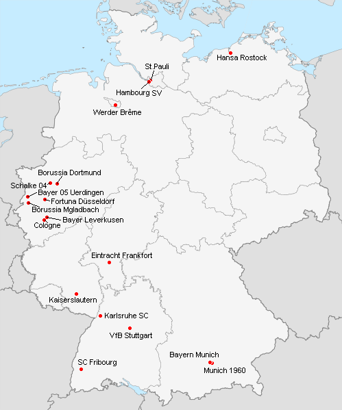 Répartition des clubs en 1.Bundesliga 1995-1996.